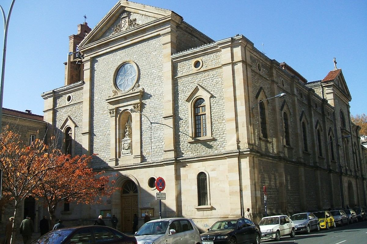 Iglesia del Carmen (PP Carmelitas Descalzos), en Vitoria-Gasteiz, País Vasco, España